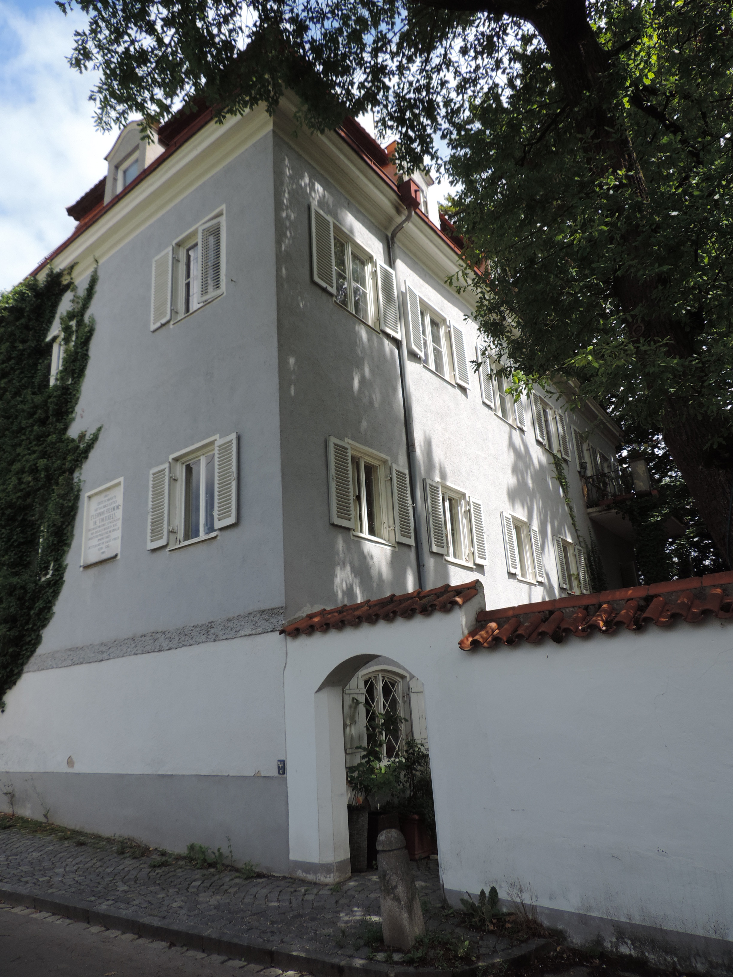 Westfront von Schloss Leitershofen